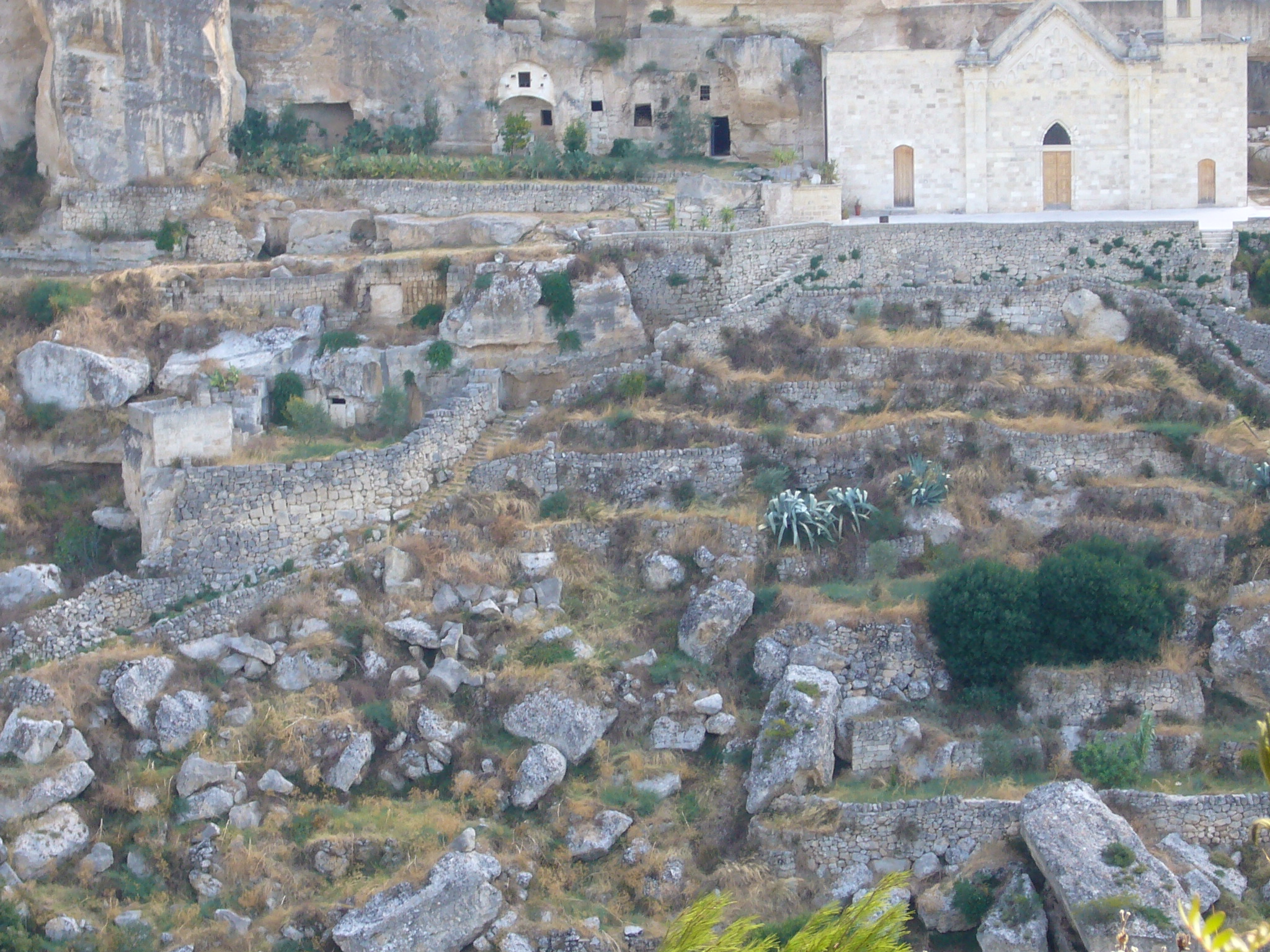 Chiesa e scorcio di gravina, Palagianello, Taranto, Puglia, Italia